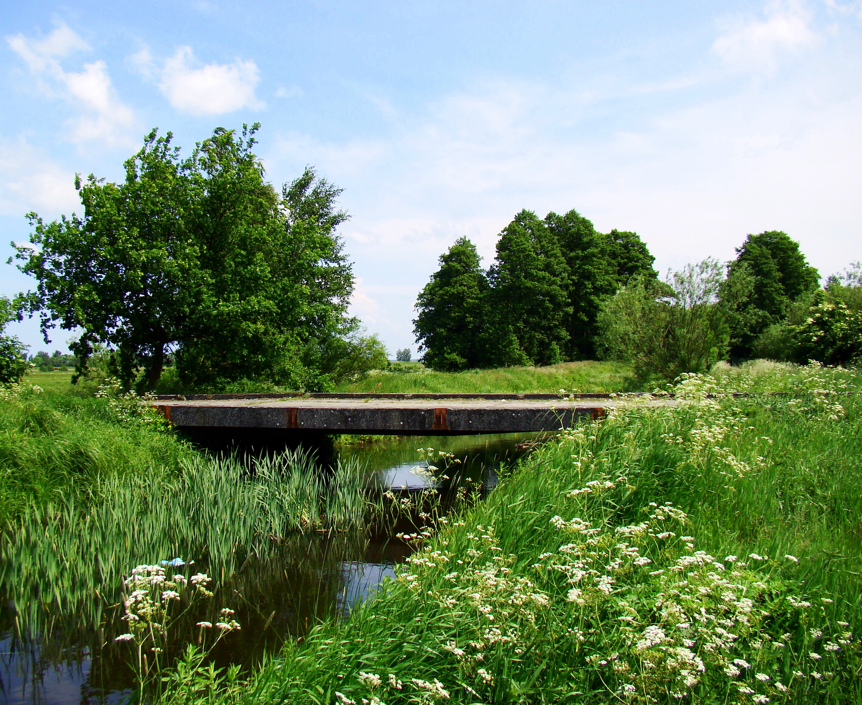 Rzeka Karpina końcowy odcinek, (Gmina Police, Województwo zachodniopomorskie), Polska